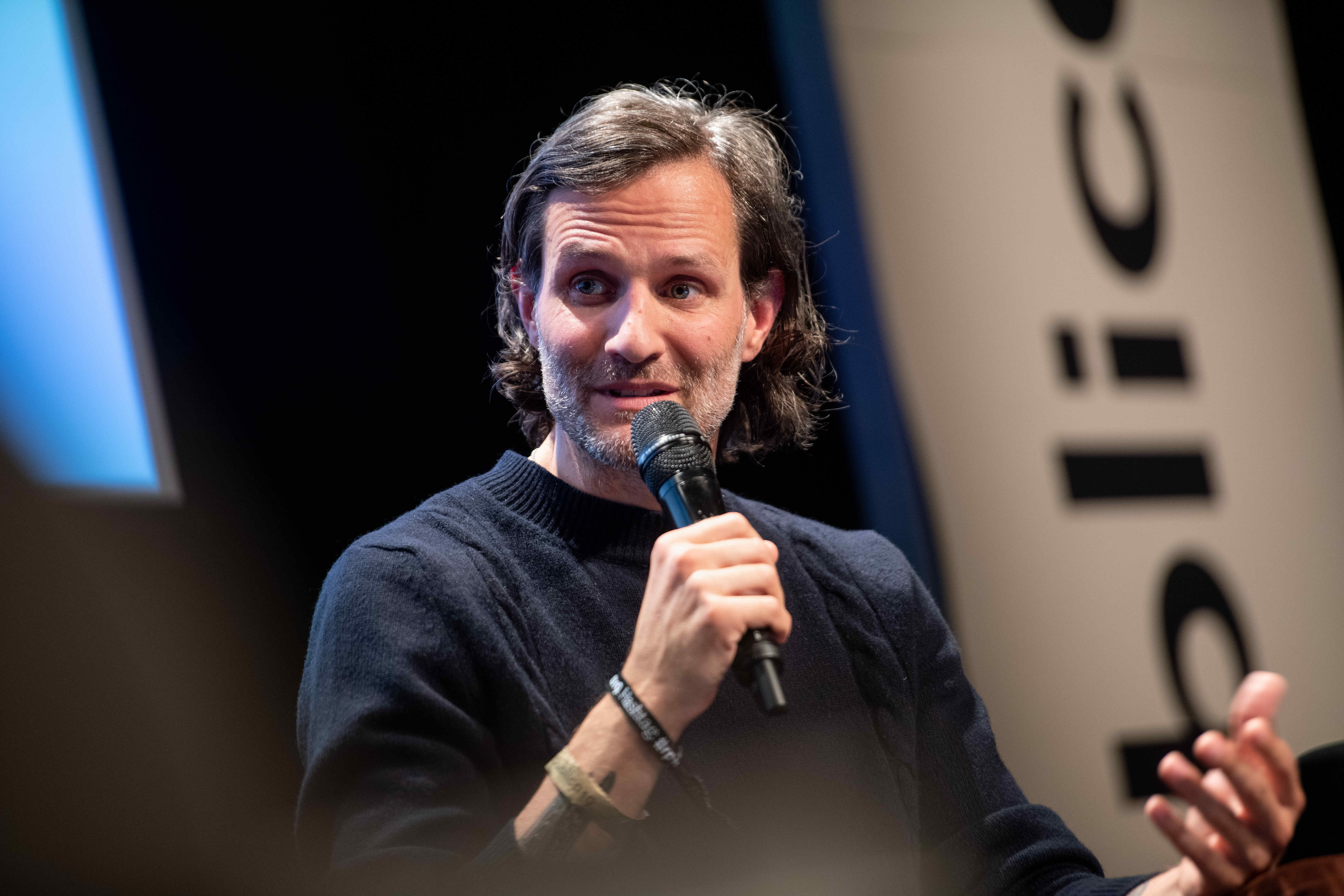 Discussion: Haltung zeigen - Lassen sich Reportage und Doku im Fernsehen neu denken? Speaker: Manuel Möglich, Eva Müller, Gülseren Ölcum, Volker Herres, Eva-Maria Lemke